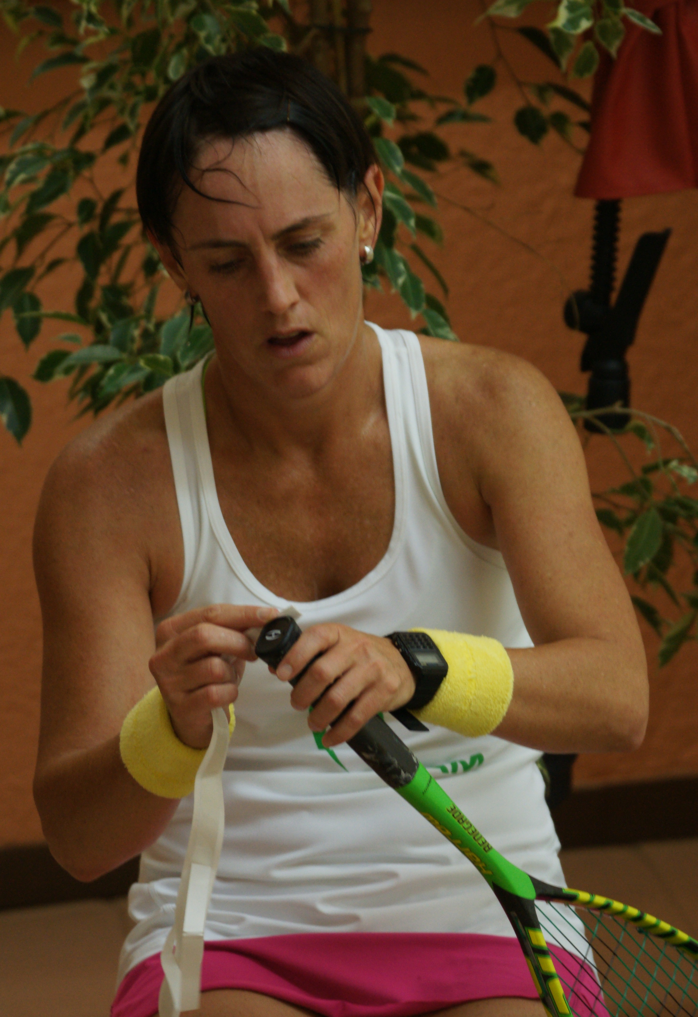 Rachael Grinham, Monte-Carlo squash classic 2015